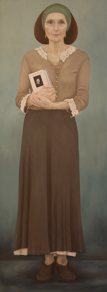 Vrouw in lange grijze rok, met groene haarband en boek in haar handen. Volledige naam is Yvette Clémentine Rouzière.